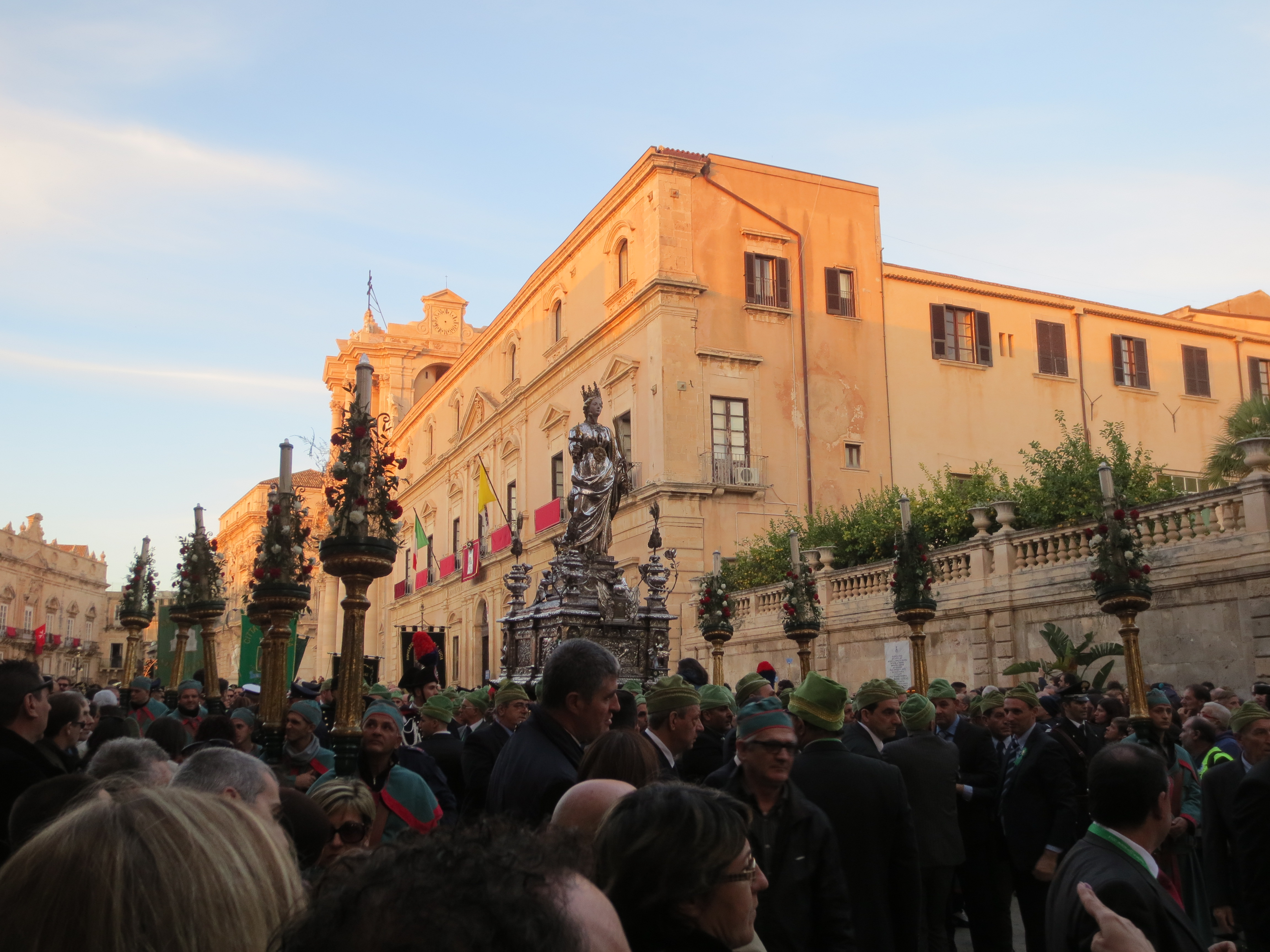 Il simulacro di Santa Lucia inizia la sua processione per le vie della città.